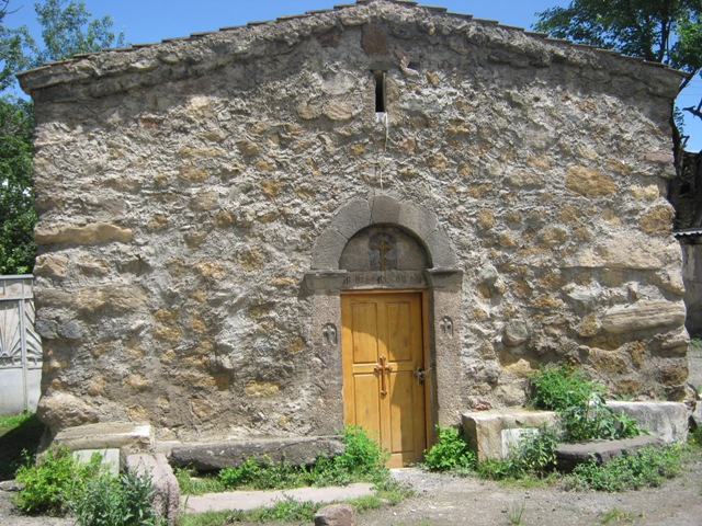 Սուրբ Ստեփանոս եկեղեցի